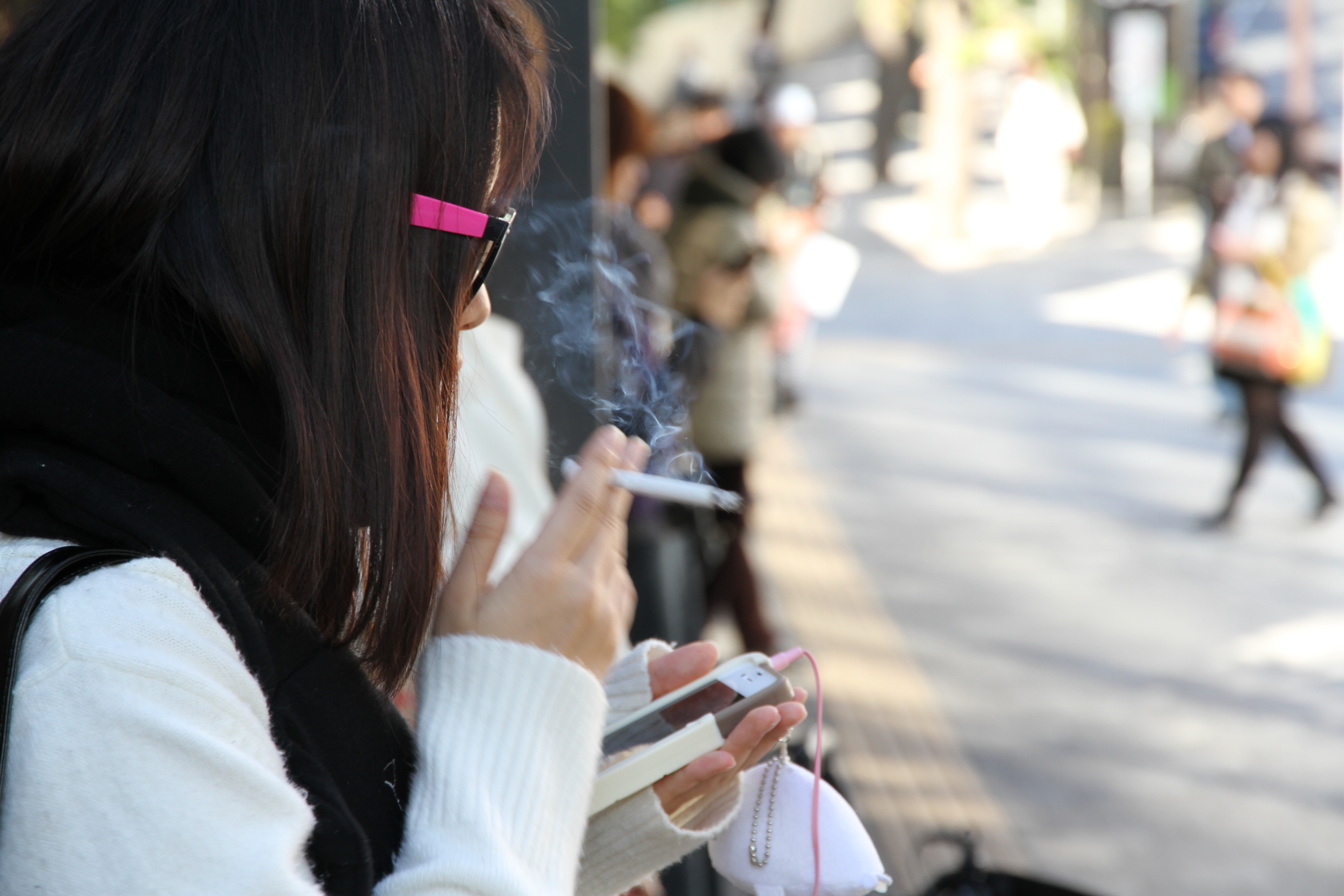 Japon / Novembre 2012